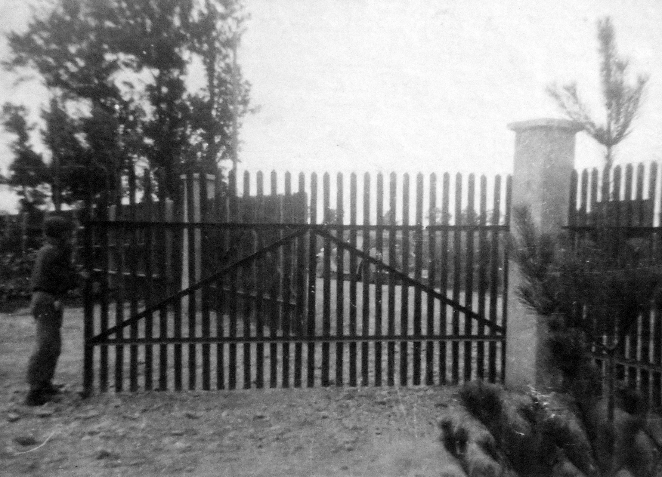 Zamknięcie bramy zakładu po odejściu okupanta, 1944